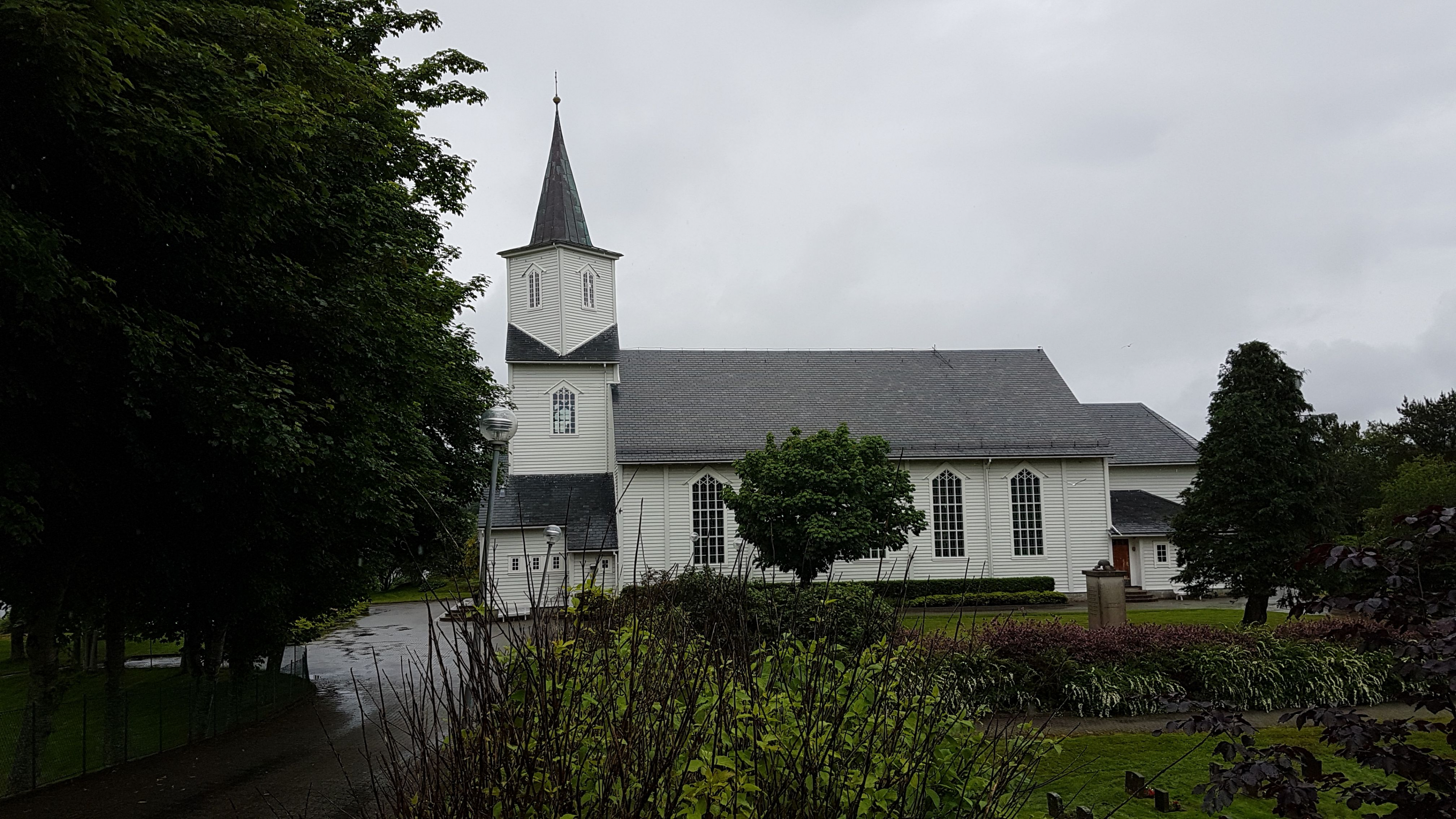 Bremnes kirke. Foto: Roger Grimelid. Fra Riksantikvarens Kulturminnesøk.